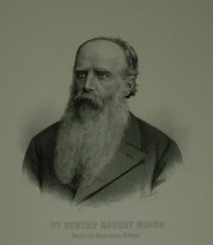 Gross, Gustav Robert, český železniční odborník